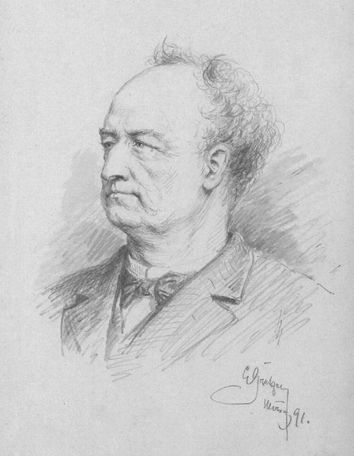 Eduard von Grützner: Bildnis des Kammersängers Kindermann, 1891 Pencil drawings, 11,5 x 9,9 cm